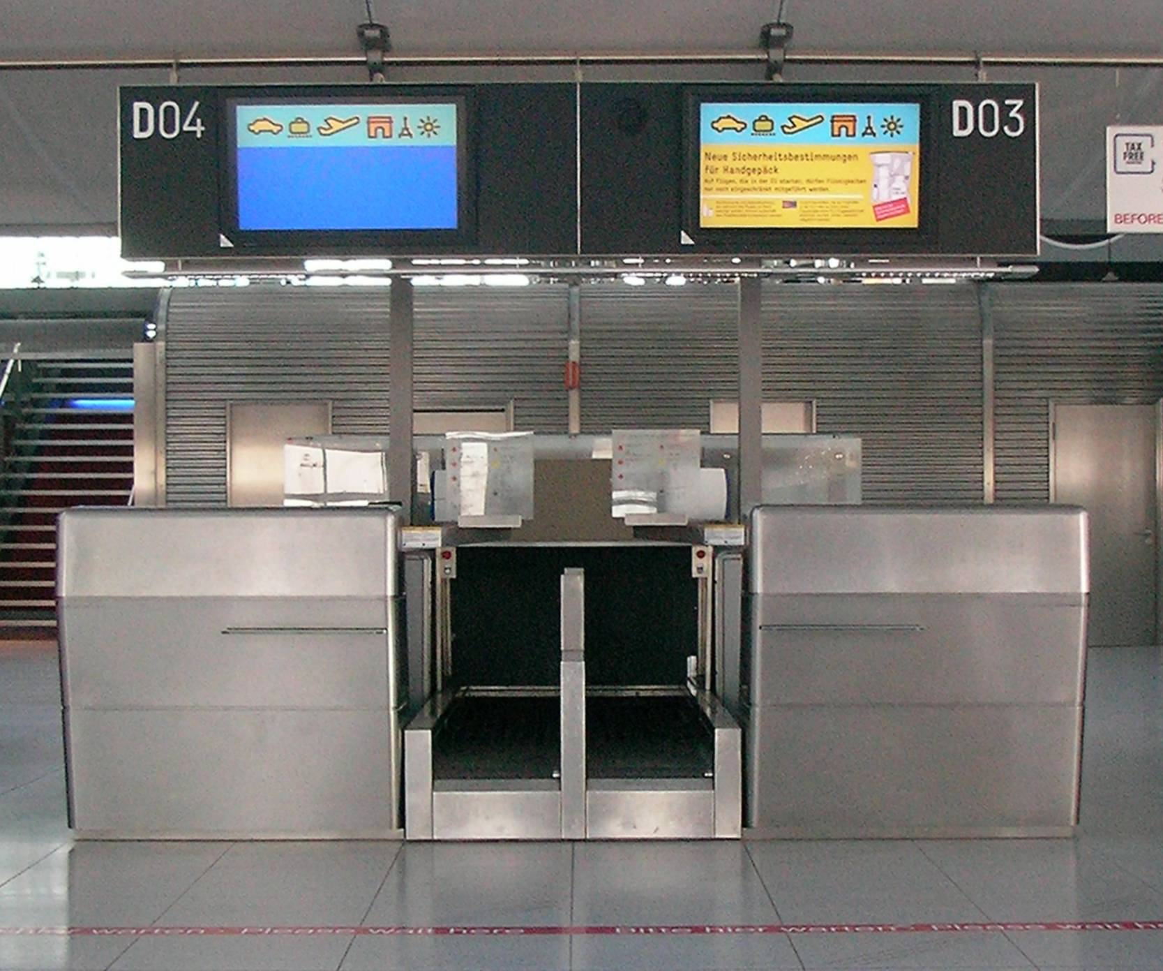 Abfertigungsschalter am Flughafen